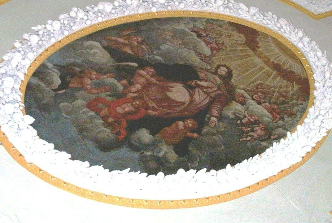 Frauenkirche Herrieden Deckendetail